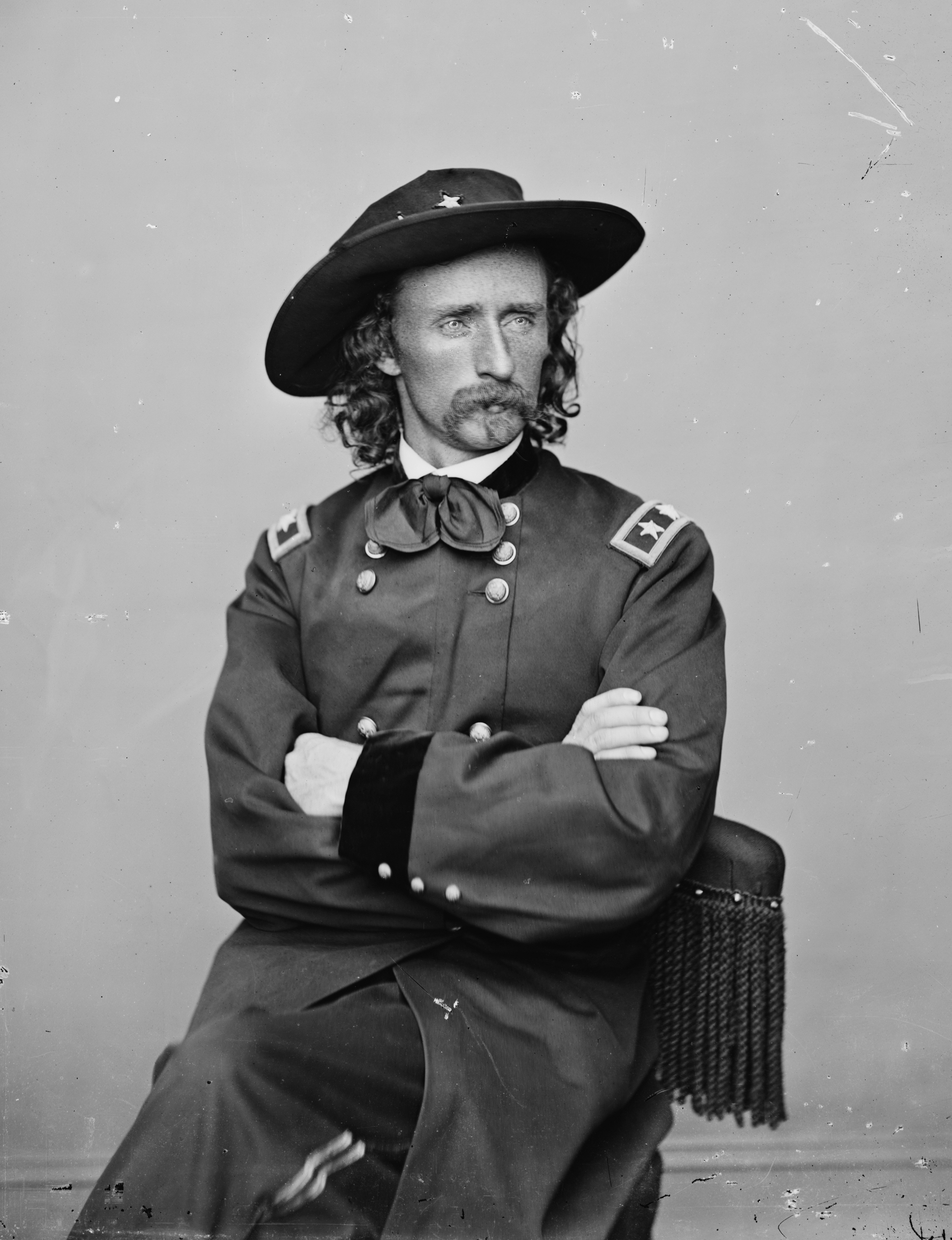 Gen. George Armstrong Custer